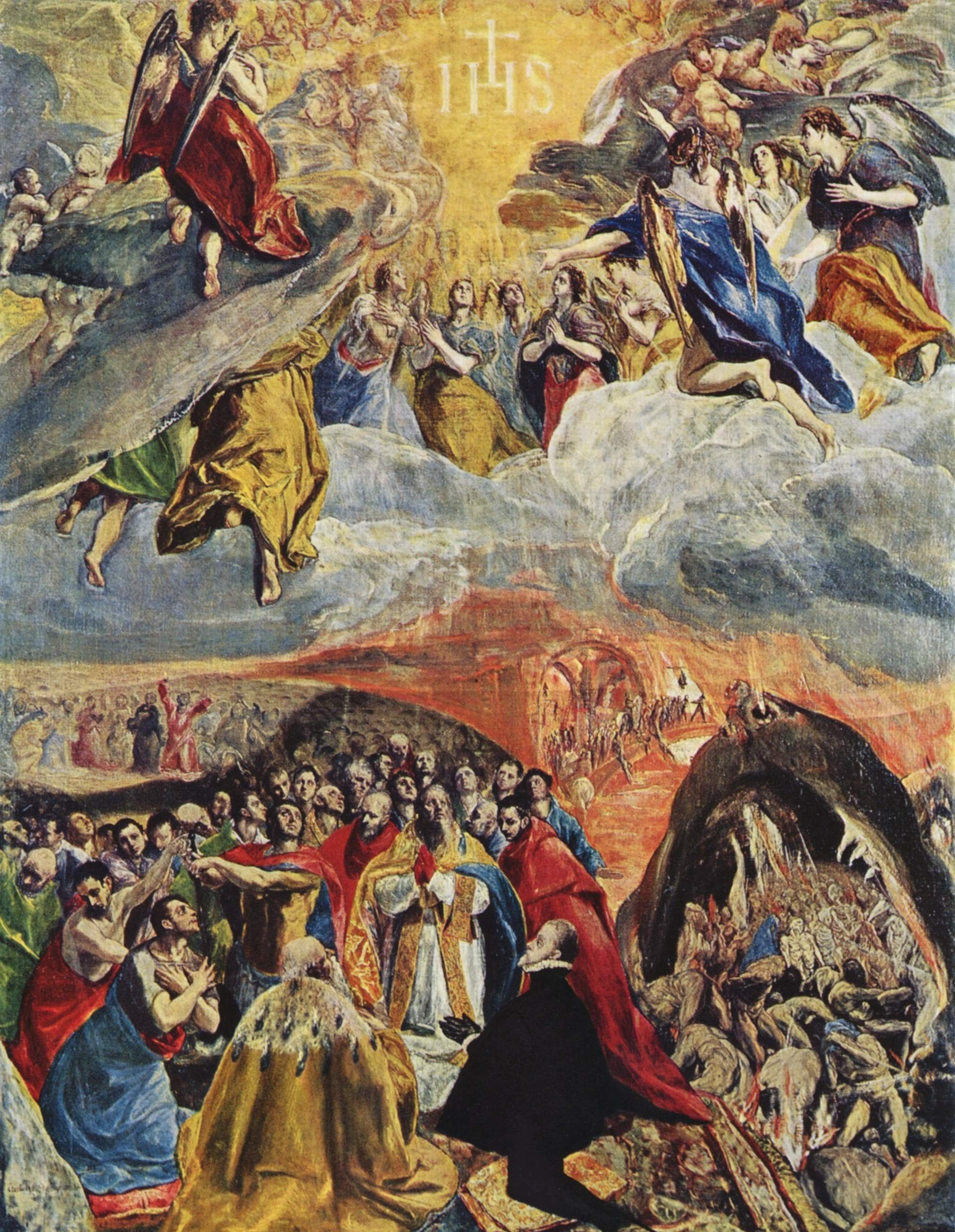 Esta obra, conocida como Adoración del nombre de Jesús, también es llamada El sueño de Felipe II o Alegoría de la Liga Santa